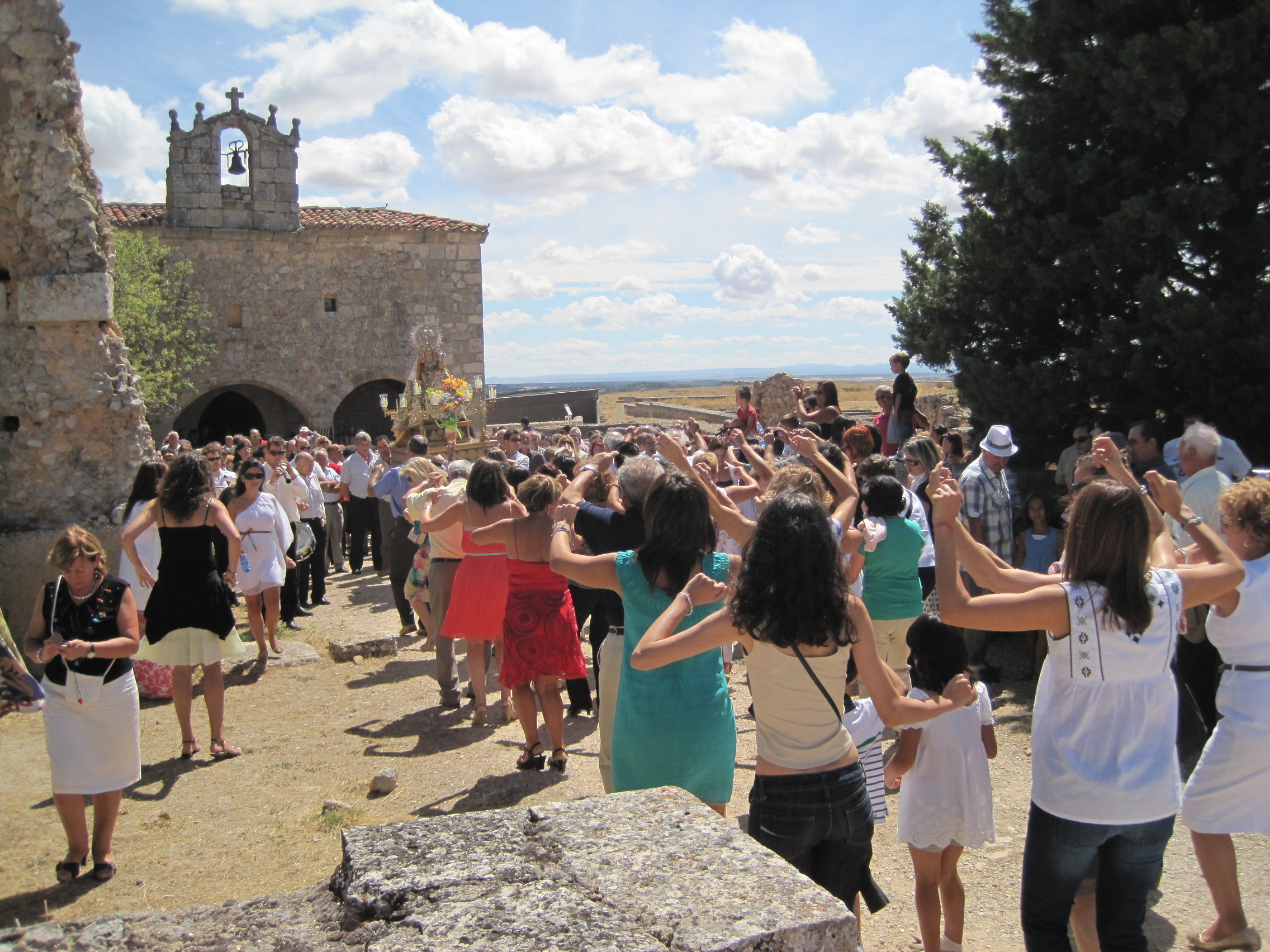 Fiesta de la Virgen de Castro, en Peñalba de Castro, Burgos (España).